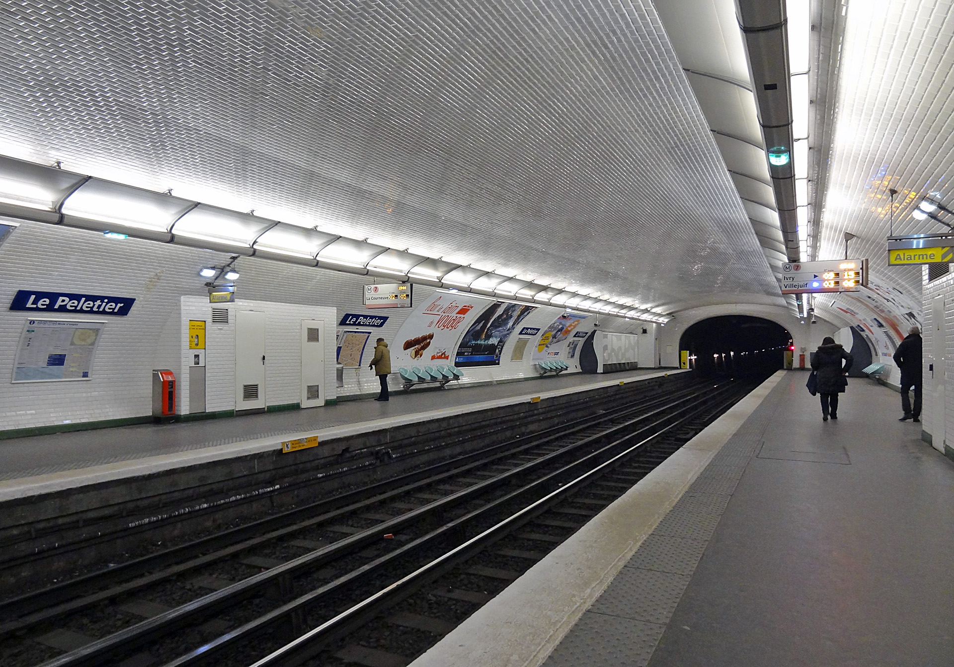 Station Le Peletier de la ligne 7 du métro de Paris, France.